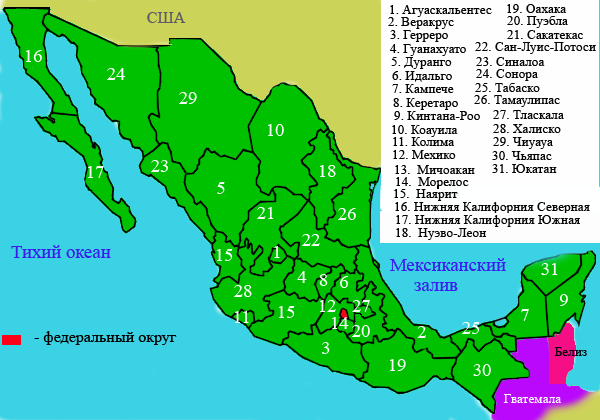 административное деление Мексики